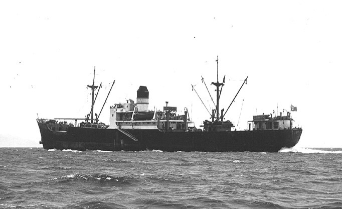 האניה המגוייסת דולפין בפיקודו של מנחם כהן מגיעה למיצרי טירן